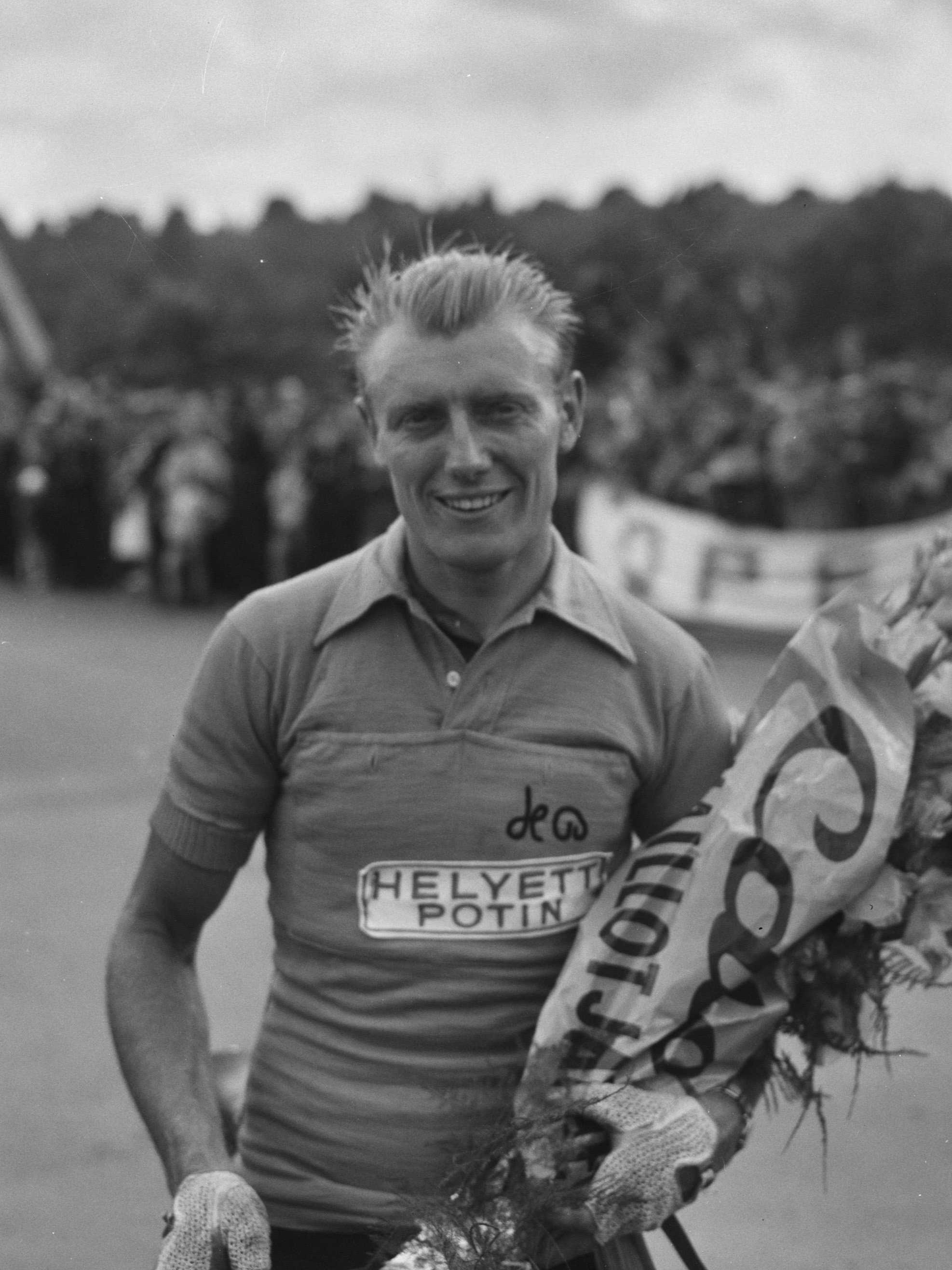 Eerste dag Tour de France Nederlands peloton Reims. Finish Darigade (Frankrijk) winnaar.